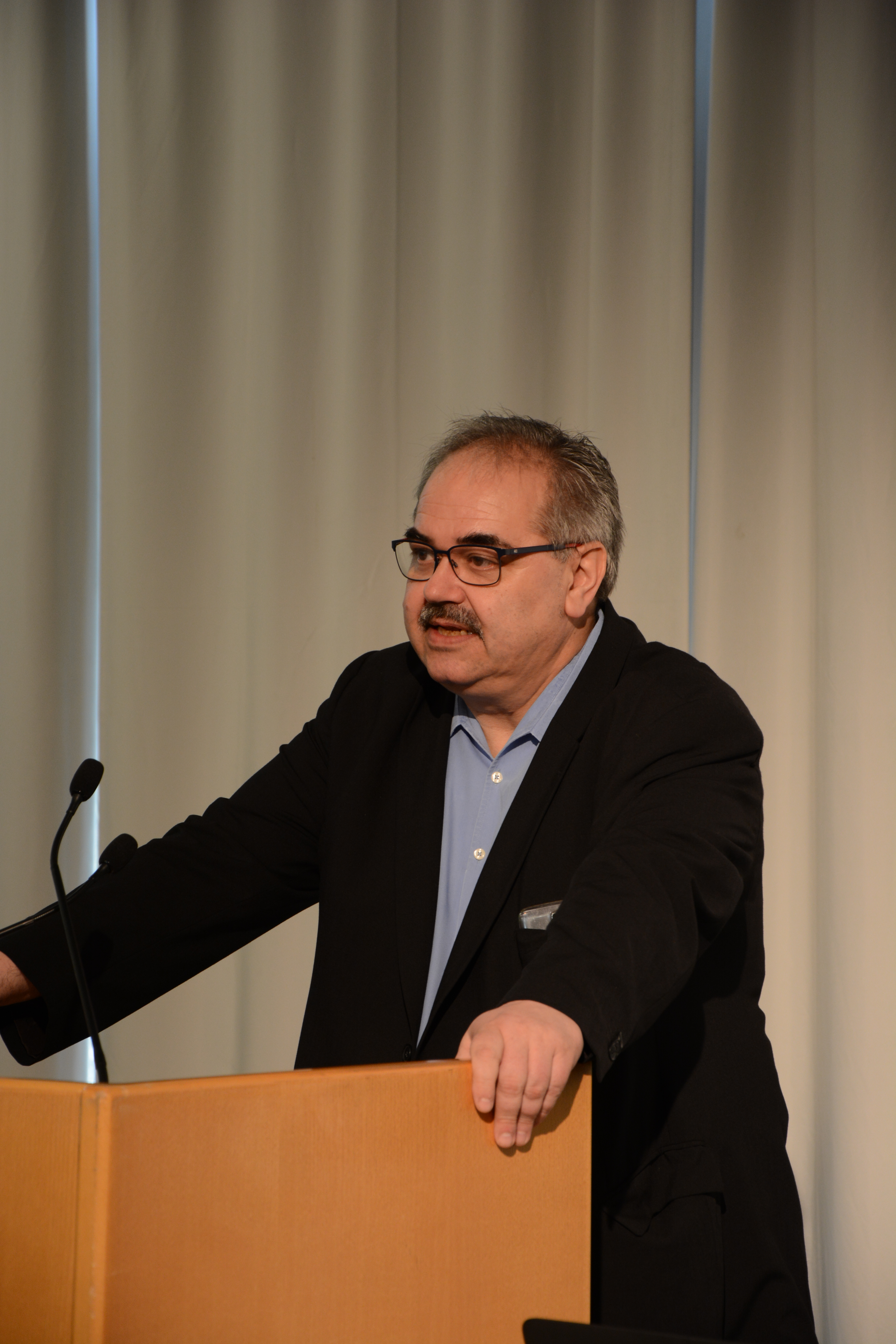 Herbert Kalb, Universitätsprofessor und ehemaliger Vizerektor der Johannes Kepler Universität Linz im Jahr 2015